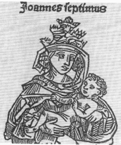 Representación medieval de la papisa Juana